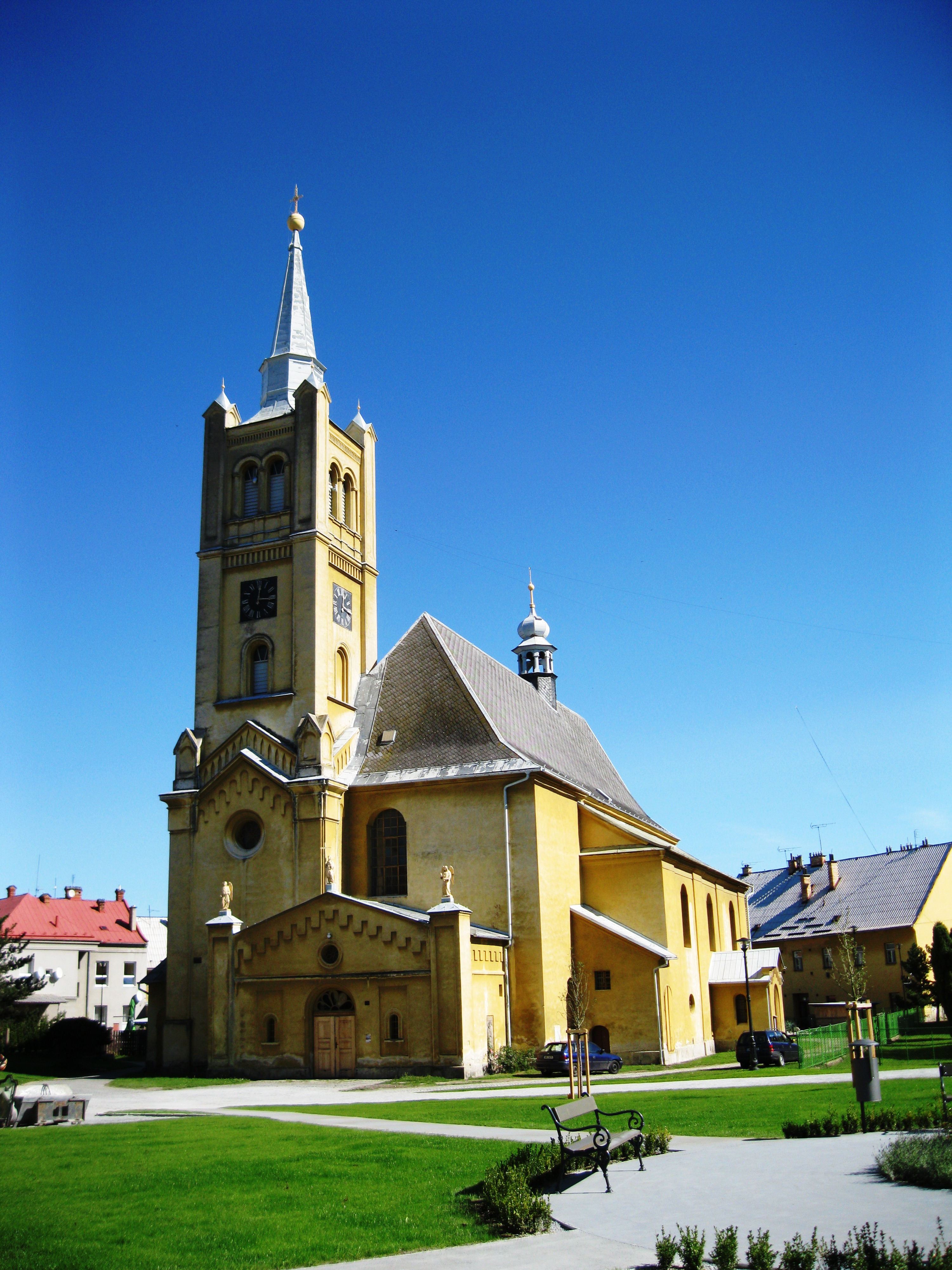 Kostel sv. Kateřiny (Vidnava), Kostelní, Vidnava